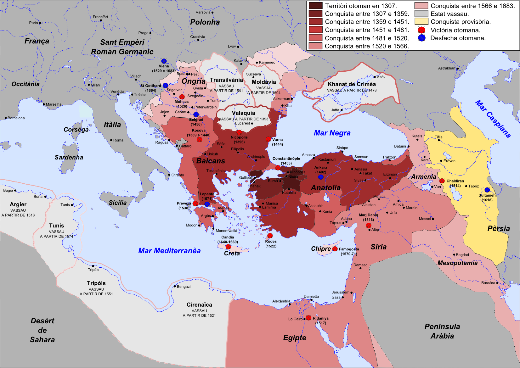 Expansion territòriala de l'Empèri Otoman de 1307 a 1683.